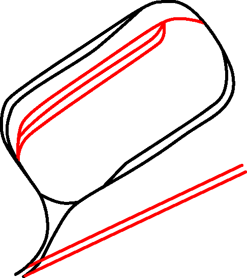 Schemat pętli tramwajowej - Olimpijska